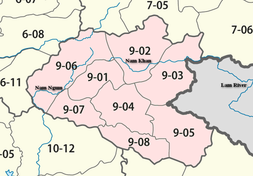 Bản đồ các huyện và sông ngòi của Xiengkhuang, Laos. Tác phẩm gốc do thành viên:Doãn Hiệu tạo ra. Hình phái sinh do người tải lên tạo ra.